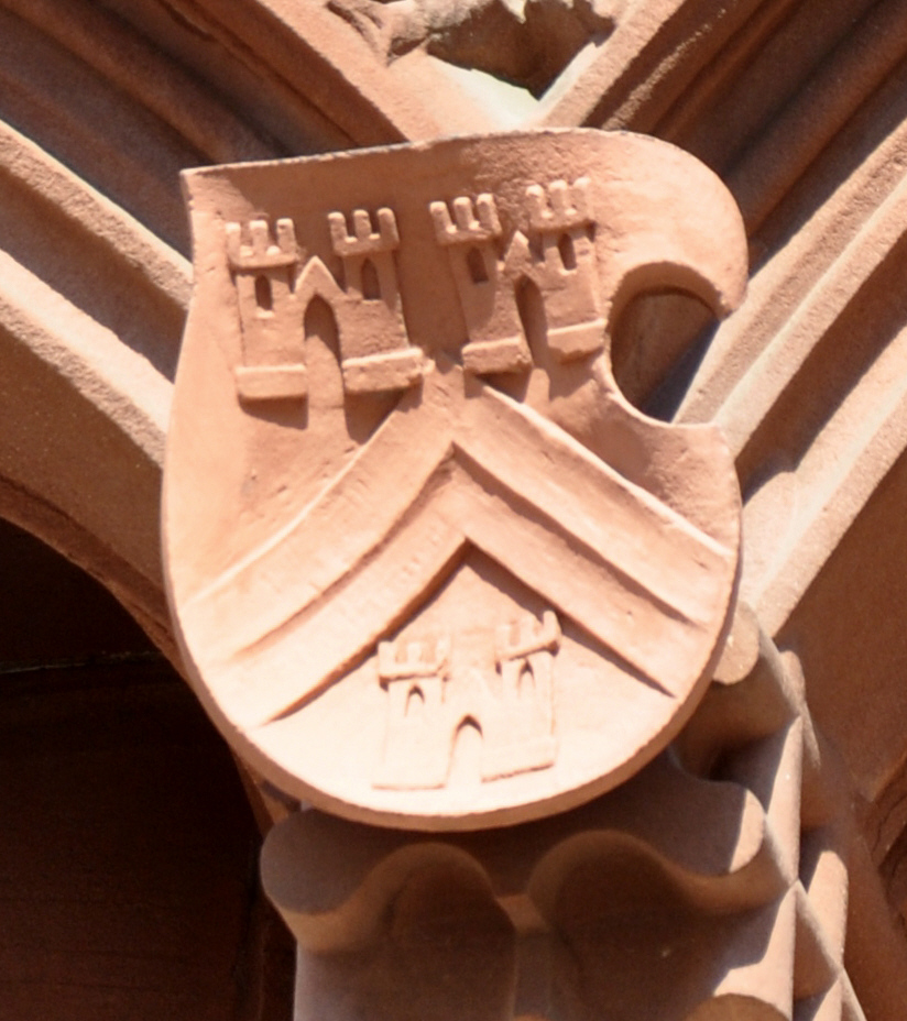 Frankfurt am Main, Rathaus (Römer), Haus zum Römer, Fassade, Wappen am Balkon, obere Reihe, Nr. 3: Familie Glauburg